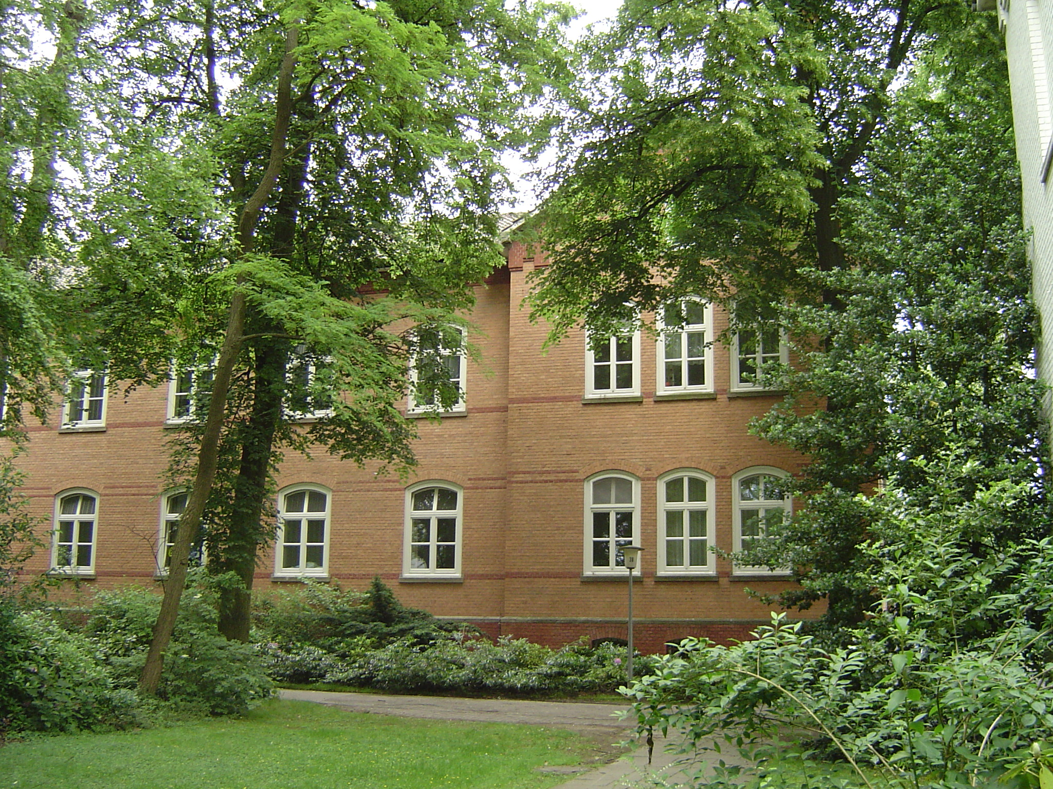 Haus im Park der Westfälischen Klinik Dortmund